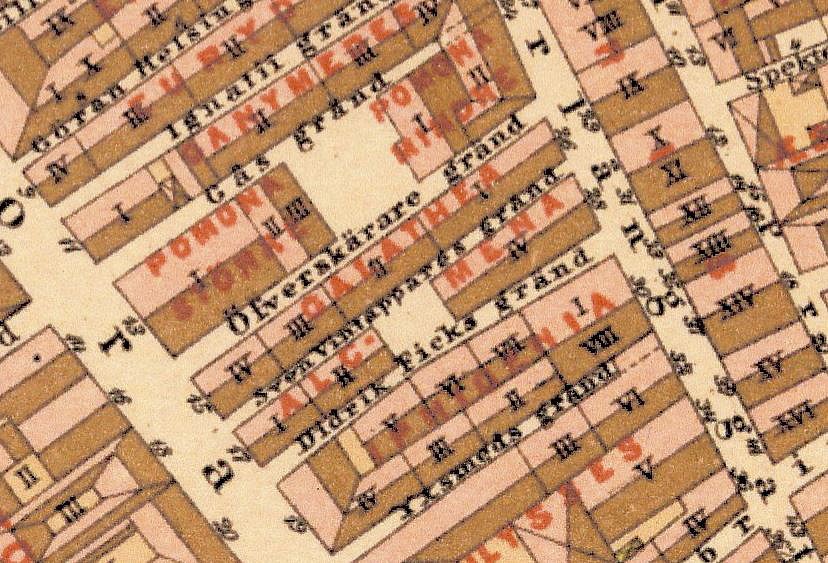 Del av Alfred Rudolf Lundgrens Stockholmskarta visande Kvarteren Alcmene, Pomona, Galatea m.fl.